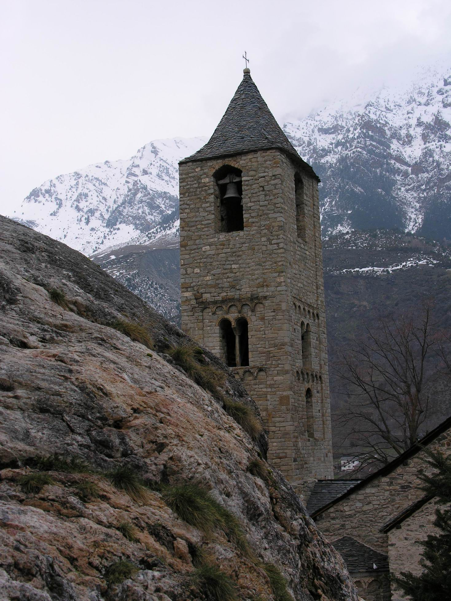 Iglesia de Sant Joan de Boi, Cataluña, España.